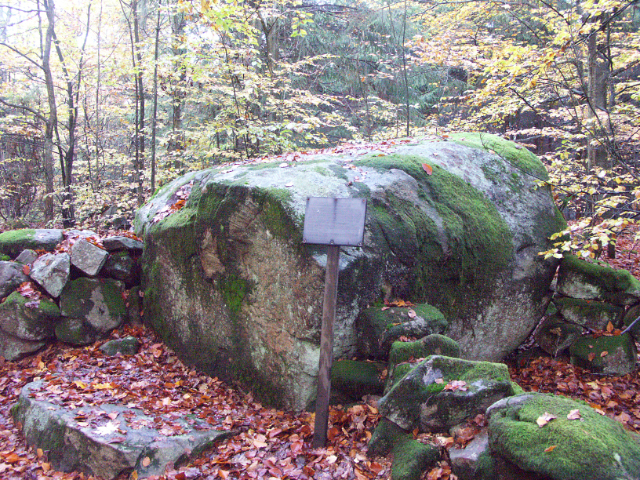 Snapphanarnas nattvardssten utanför Oderljunga i Perstorps kommun.